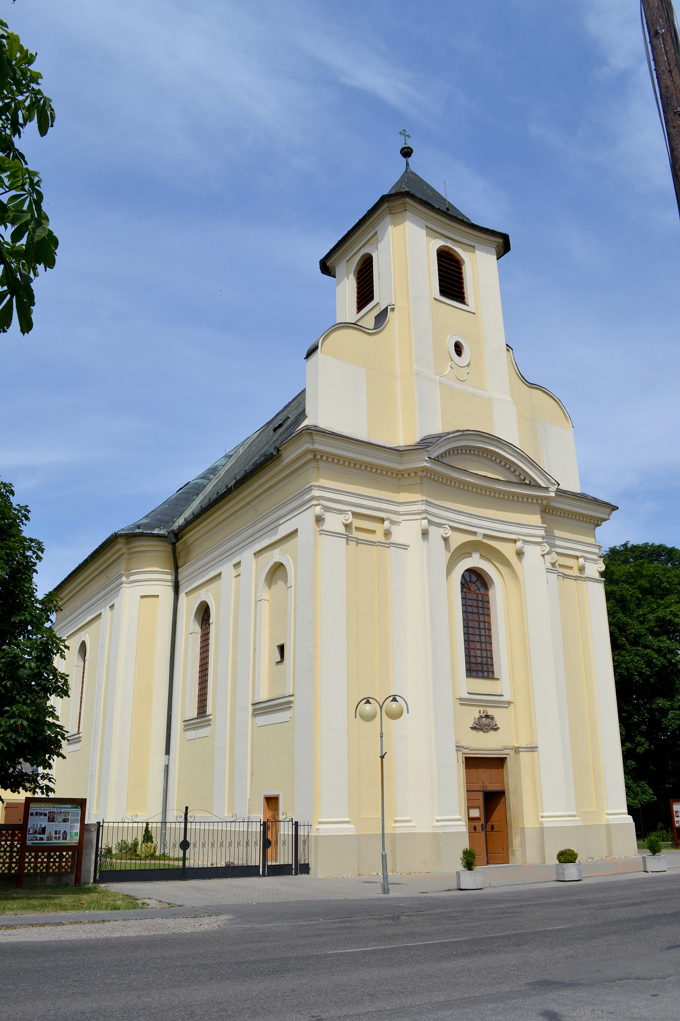 Neskorobarokový Kostol Povýšenia svätého Kríža v miestnej časti Dunajskej Lužnej Jánošíková z rokov 1786 - 1797; celkový pohľad